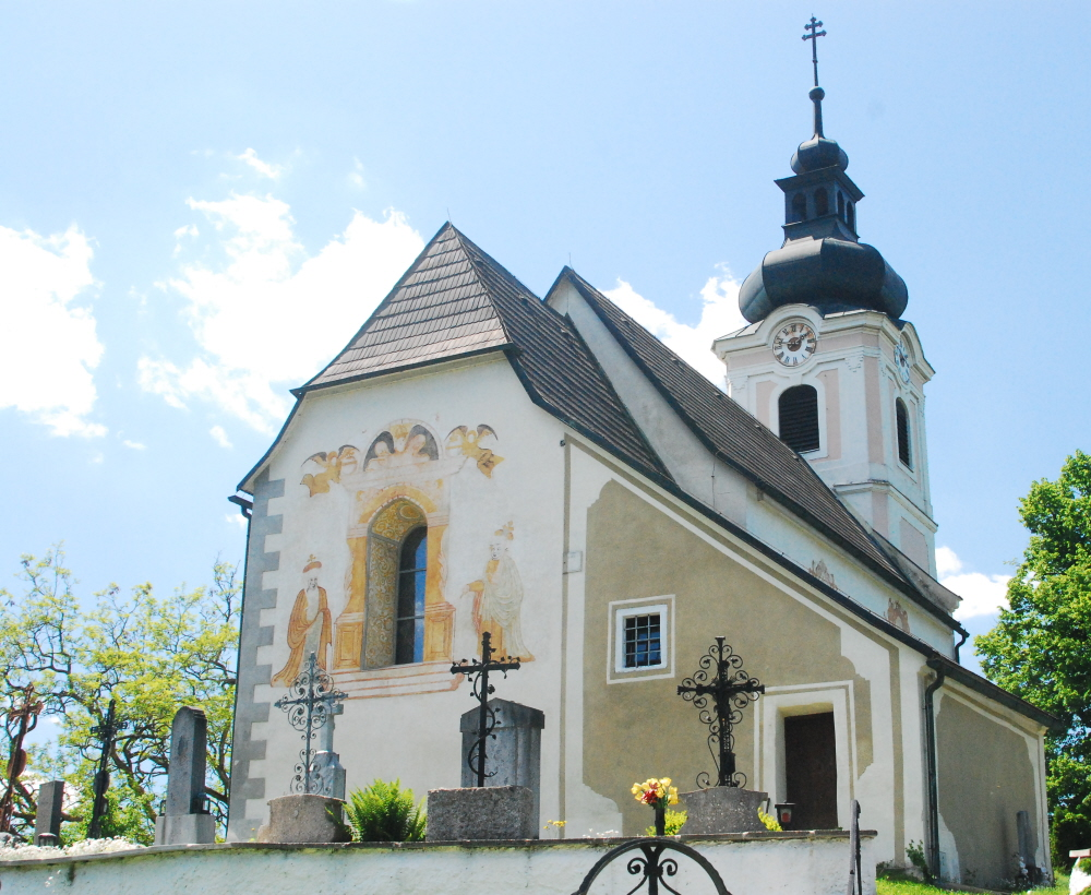 Die Pfarrkirche von Eibenstein an der Thaya in Niederösterreich